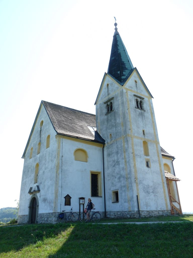 Sv. Ožbalt nad Ponikvo